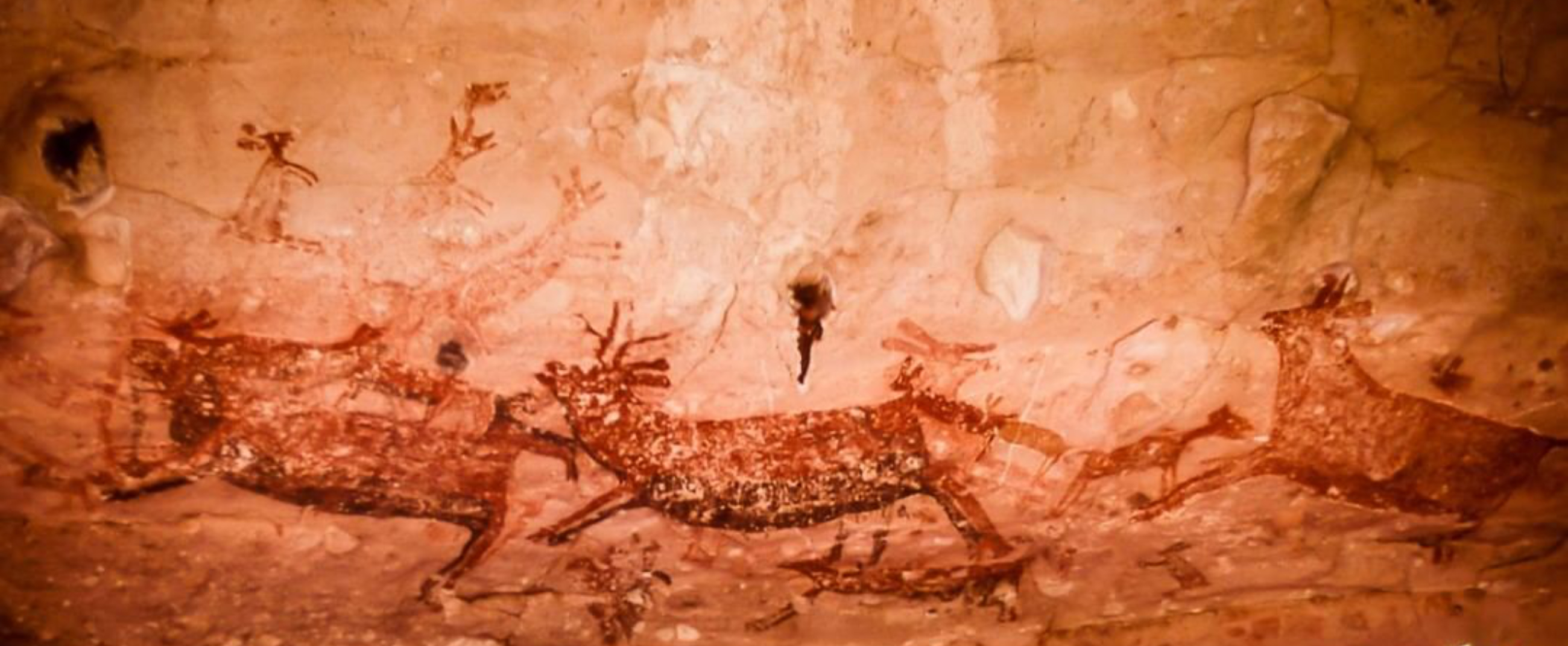 Los primeros hombres an América datan de hace 12 mil años. En su viaje entraron a la península de Baja California, donde realizaron pinturas en la cuevas que representan sus vidas cotidianas. Lo que cazaban y comían. Las figuras de la fotografía tienen grandes dimensiones que no se alcanzan a percibir.